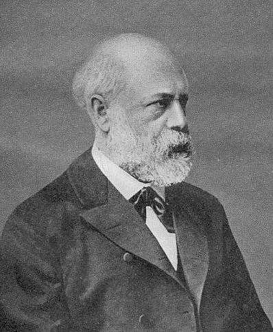 Ludwig Friedländer Ludwig Friedländer, deutscher Altphilologe